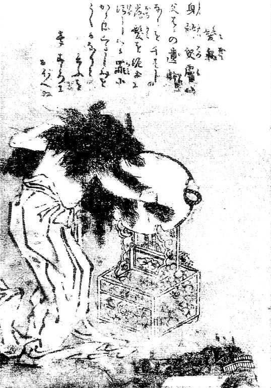 Kami-oni (髪鬼) from the Gazu Hyakki Tsurezure Bukuro (百器徒然袋)